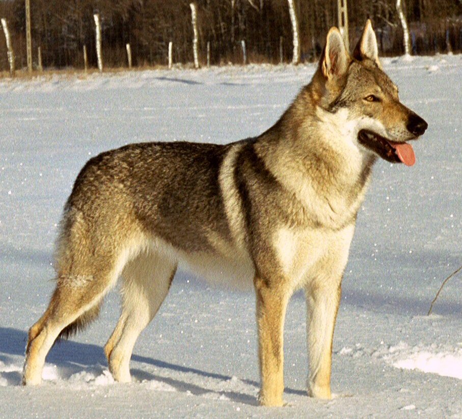 Tsjecho-Slowaakse wolfhond - Jolly z Molu Es